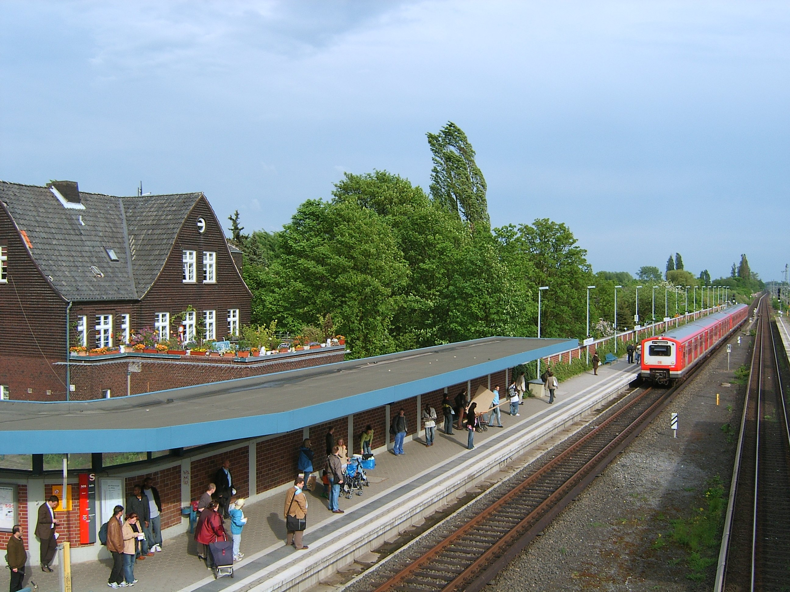 Hamburg, S-Bahnhof Billwerder-Moorfleet.